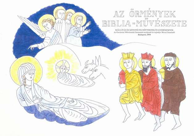 Örmény művészeti füzet borítója a Háromkirályokkal